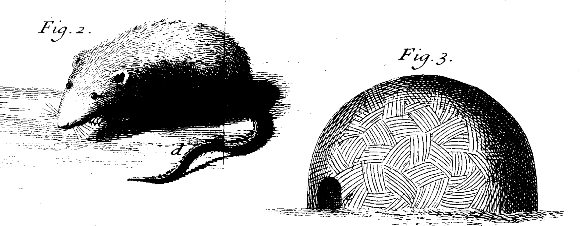 Gravure de Ph. Simonneau, fils, pour une communication de Michel Sarrazin lue à l'Académie royale des sciences de France par Réaumur